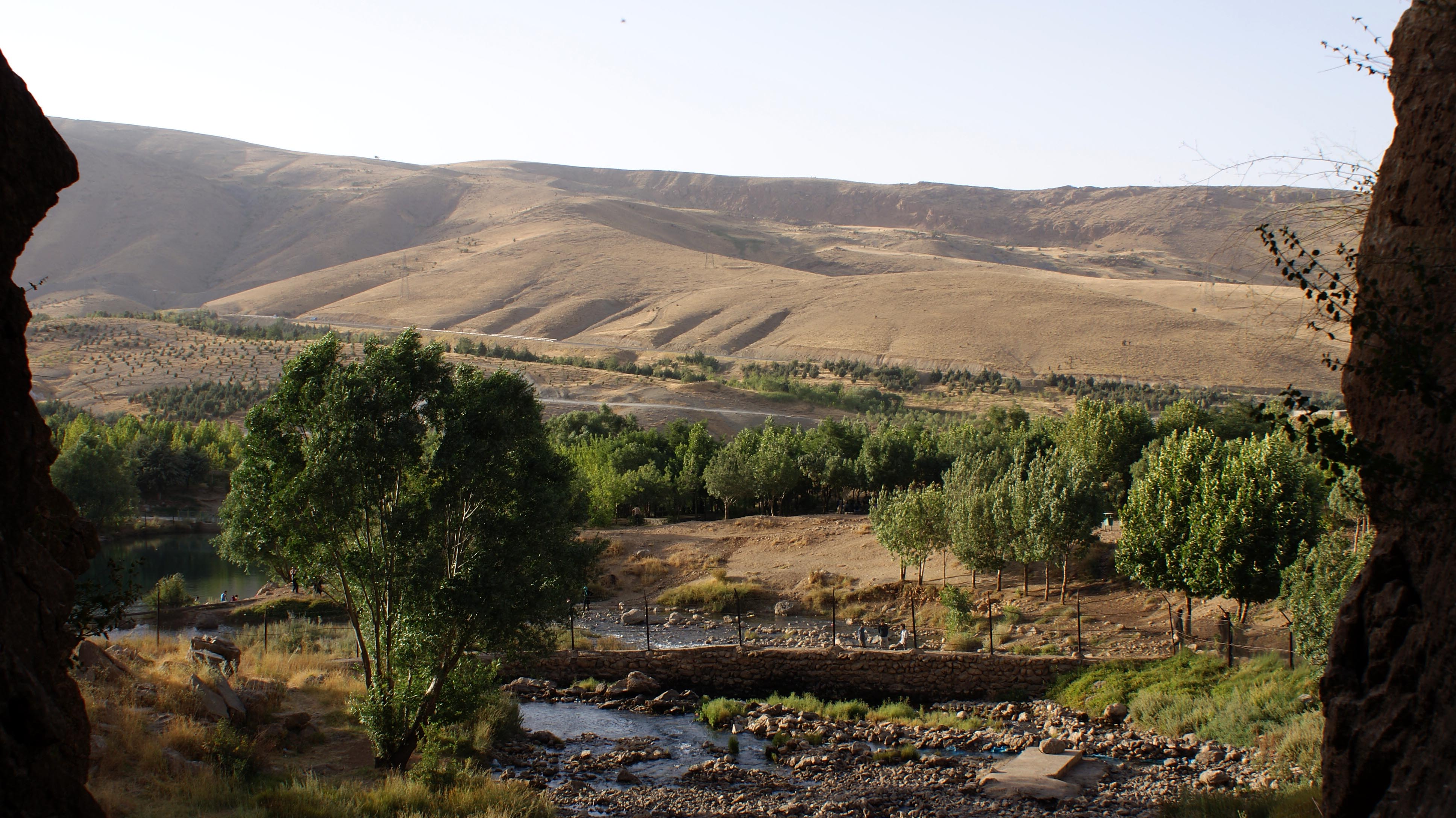 نهاوند - سراب كيان